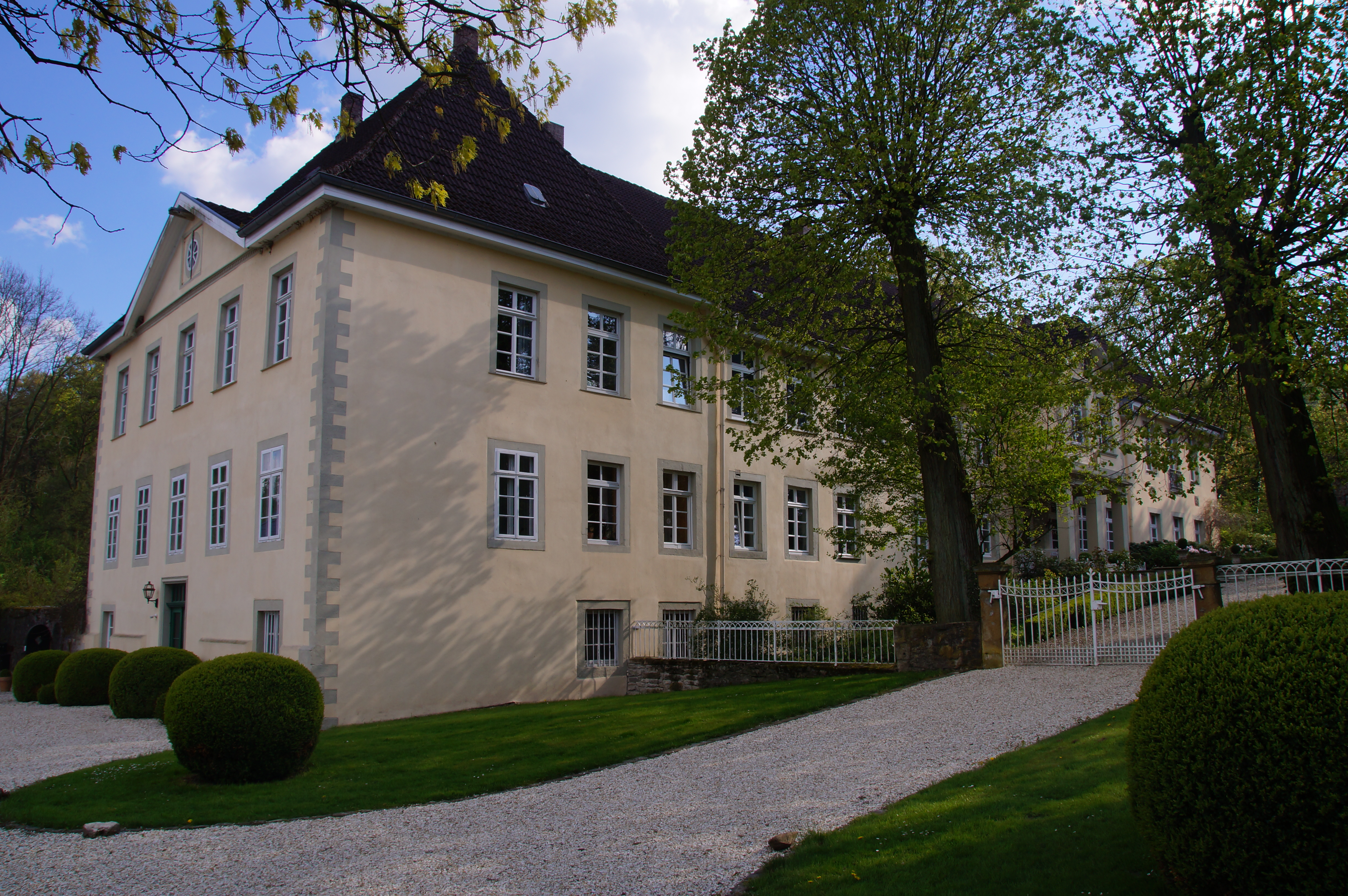 Gut Barkhausen in Leopoldshöhe, Germany This is a photograph of an architectural monument.